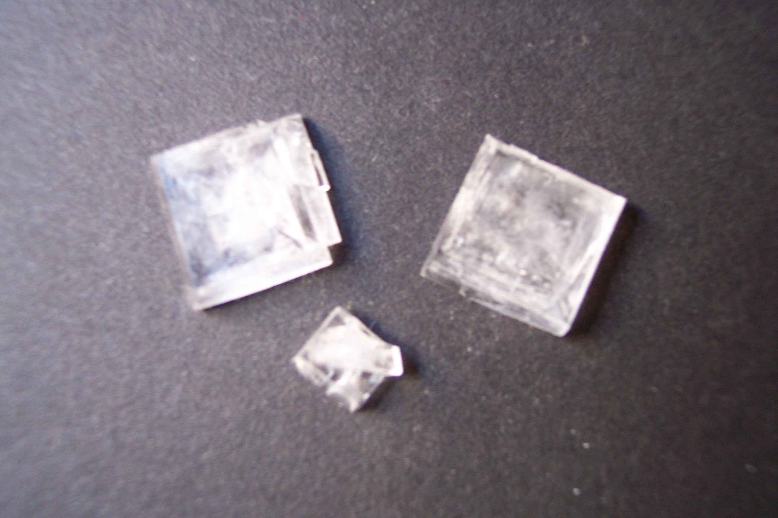 Beschreibung: Ammoniumcitrat-Kristalle Quelle: Bild selbt erstellt Datum: 28. Oktober 2006 Autor: Toffel